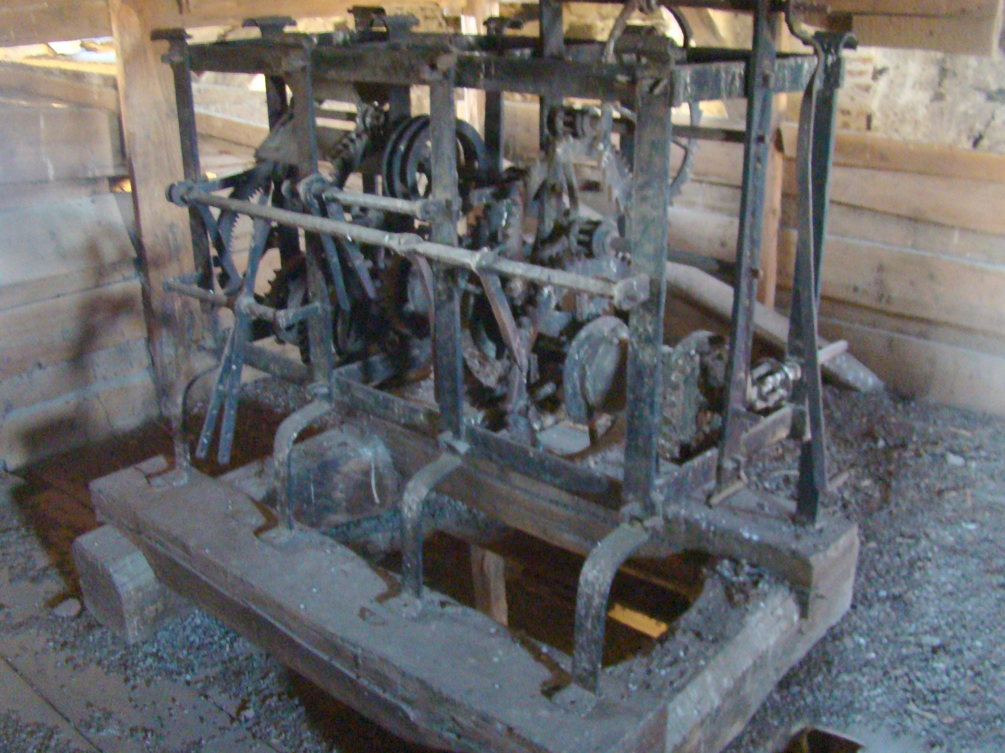 Biserica evanghelică fortificată din Nou, județul Sibiu